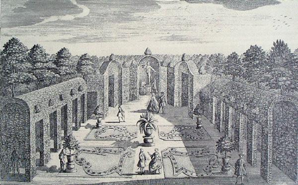 Villa Ghirlanda Silva, incisione di Karl Remshart raffigurante il Giardino dei Semplici, all'interno del parco.